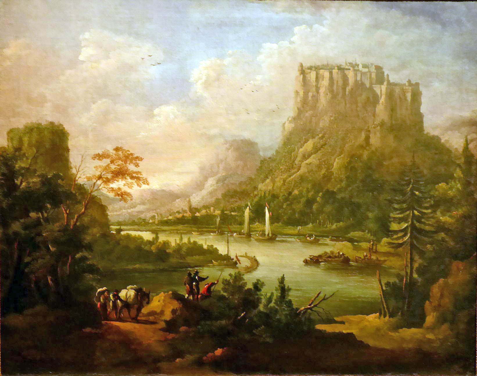 Johann Alexander Thiele: "Elblandschaft mit Königstein", Pommersches Landesmuseum Greifswald